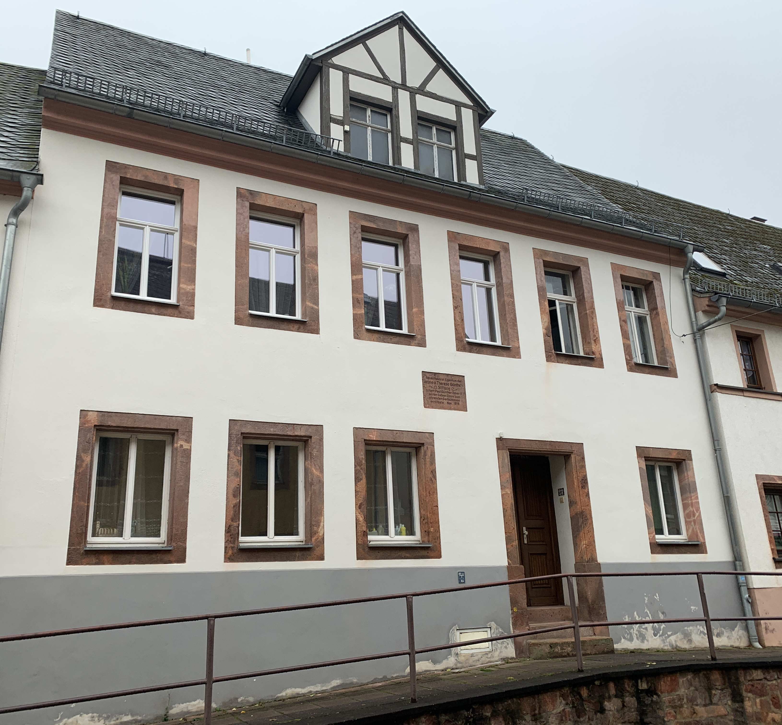 Kulturdenkmal Wohnhaus Leipziger Straße 23 in Geithain